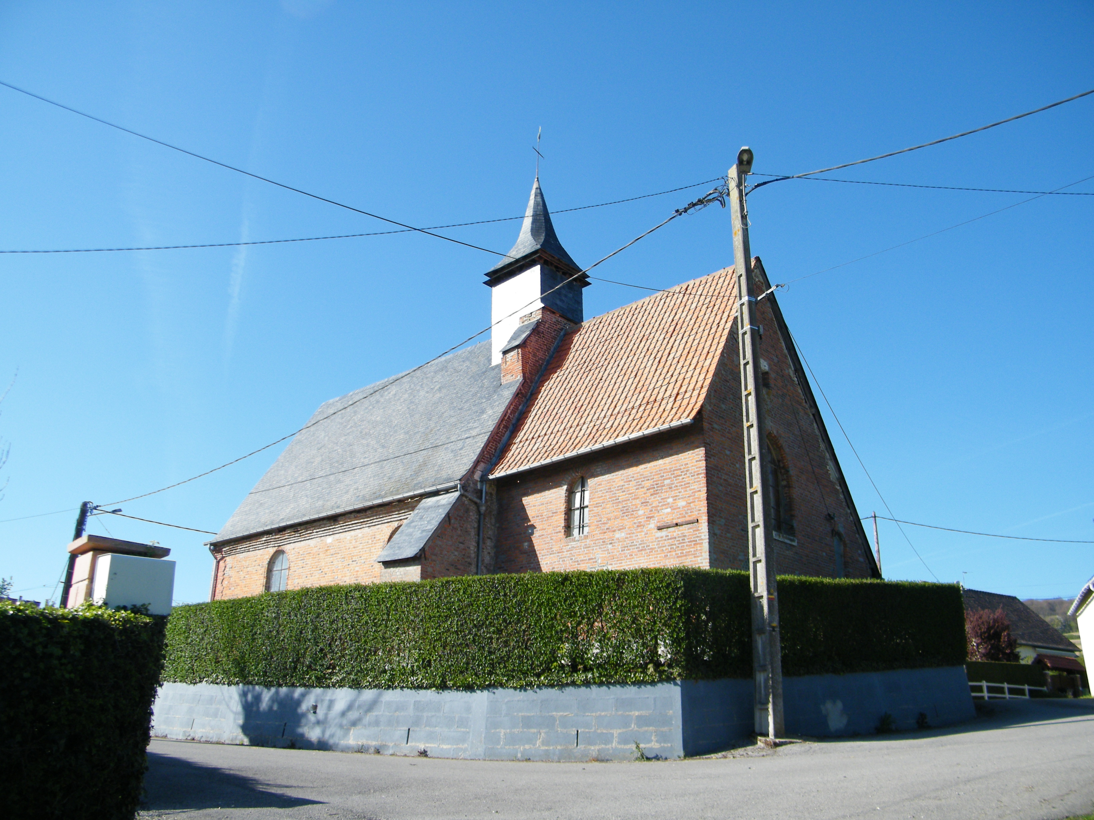 L'église avec ses tuiles.